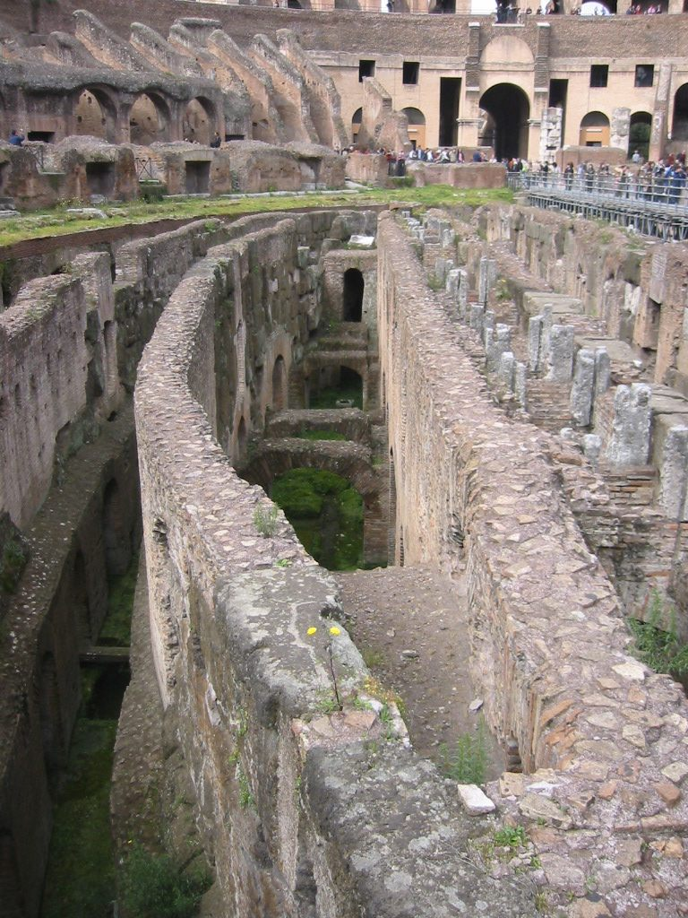 Detalj inne fra Colosseum, hvor vi ser gangene som tidligere var under gulvet i arenaen.